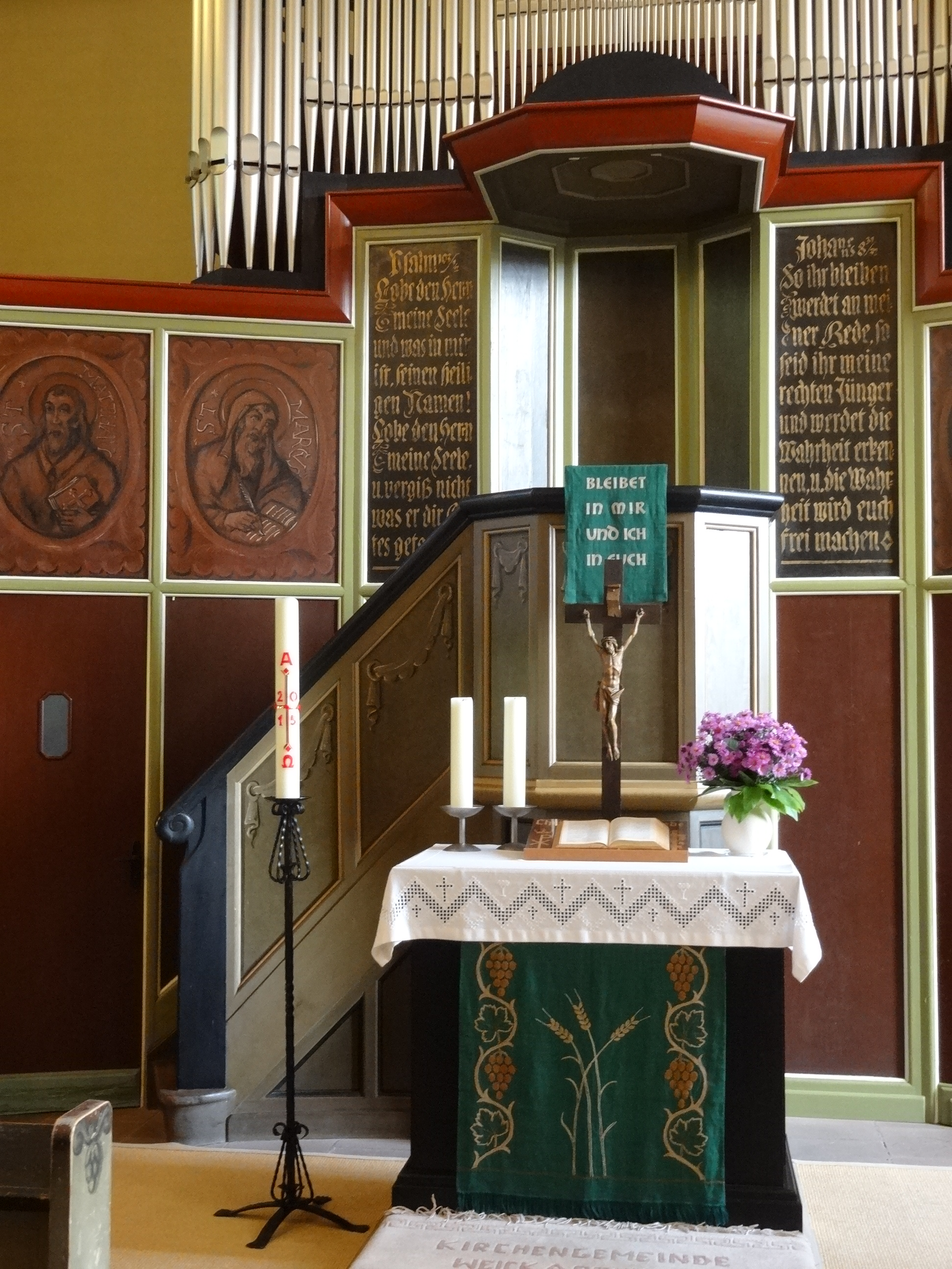 Evangelische Kirche Weickartshain